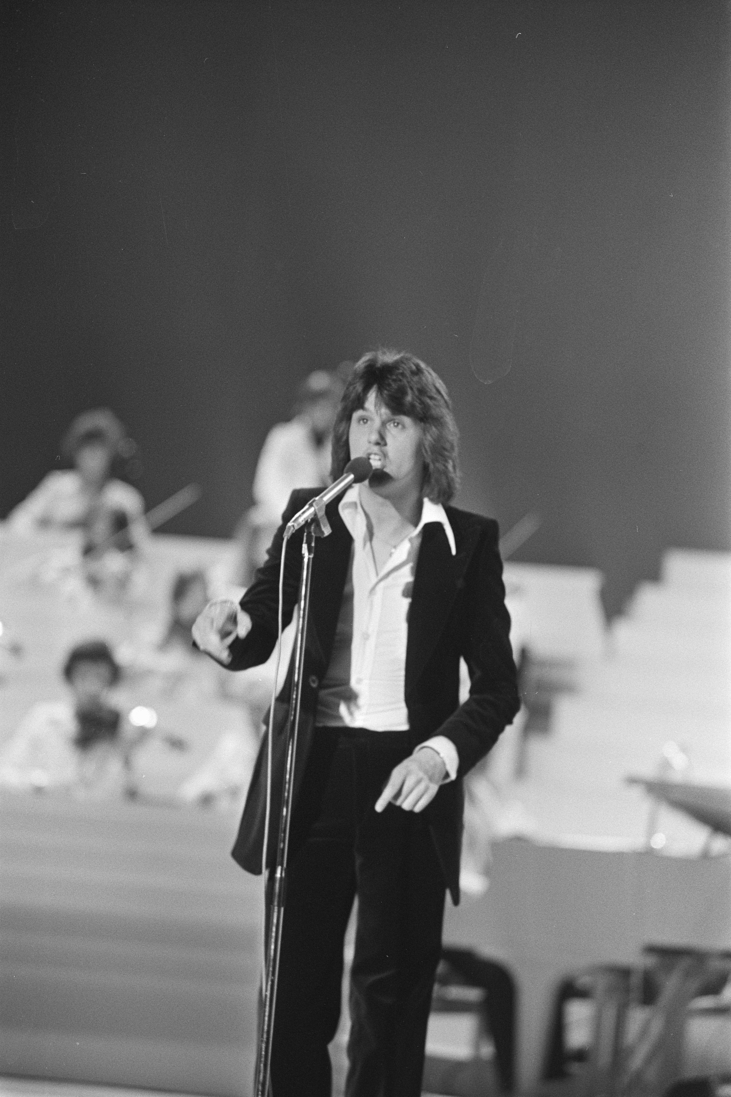 Collectie / Archief : Fotocollectie Anefo Reportage / Serie : [ onbekend ] Beschrijving : Nationaal Songfestival in Jaarbeurs Utrecht; Albert West tijdens generale repetitie Datum : 26 februari 1975 Locatie : Utrecht Trefwoorden : repetities, zangers Instellingsnaam : Nationaal Songfestival Fotograaf : Bogaerts, Rob / Anefo Auteursrechthebbende : Nationaal Archief Materiaalsoort : Negatief (zwart/wit) Nummer archiefinventaris : bekijk toegang 2.24.01.05 Bestanddeelnummer : 927-7796